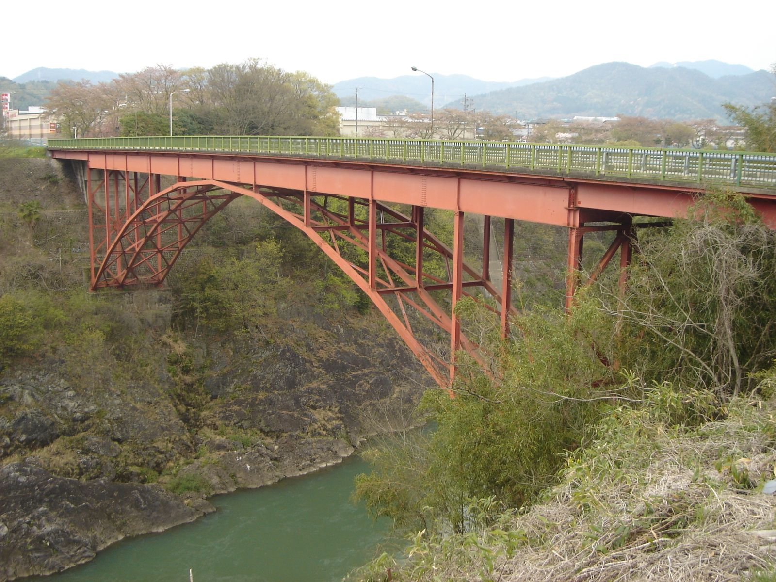 Kaneyama Bridge(兼山橋、木曽川),Kani,Gifu,Japan(岐阜県可児市)で下流側より撮影。